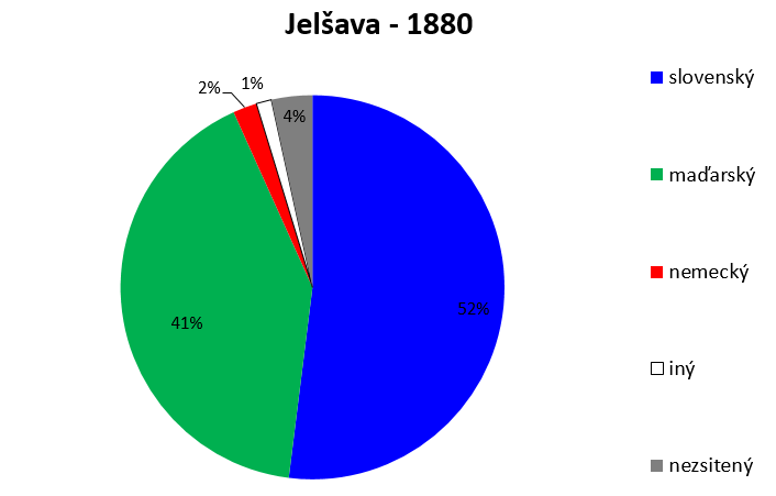 jazykové zloženie